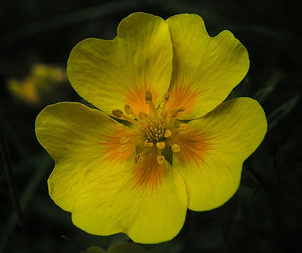 Gold-Fingerkraut (potentilla aurea), aufgenommen auf einer Bergwiese in der Nähe von Bolsterlang (Allgäuer Alpen)